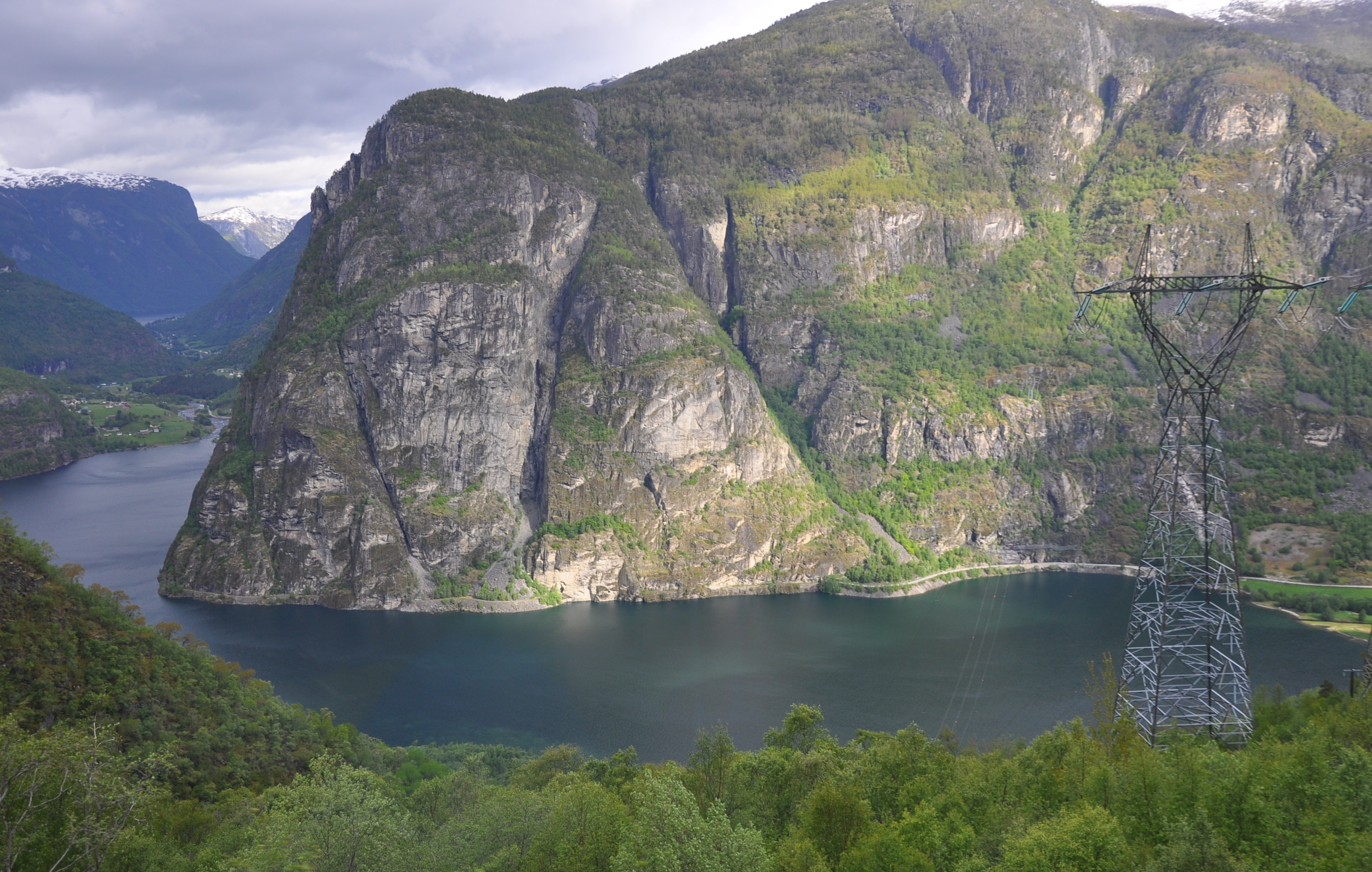 Vassbygdevatnet